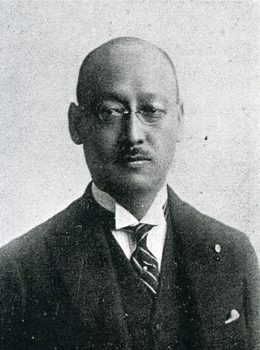 この写真は、溝口直亮（1878-1951）の写真です。